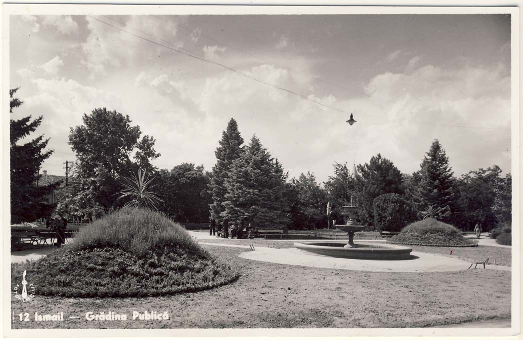 Северная часть Горсада и фонтан (разрушен)